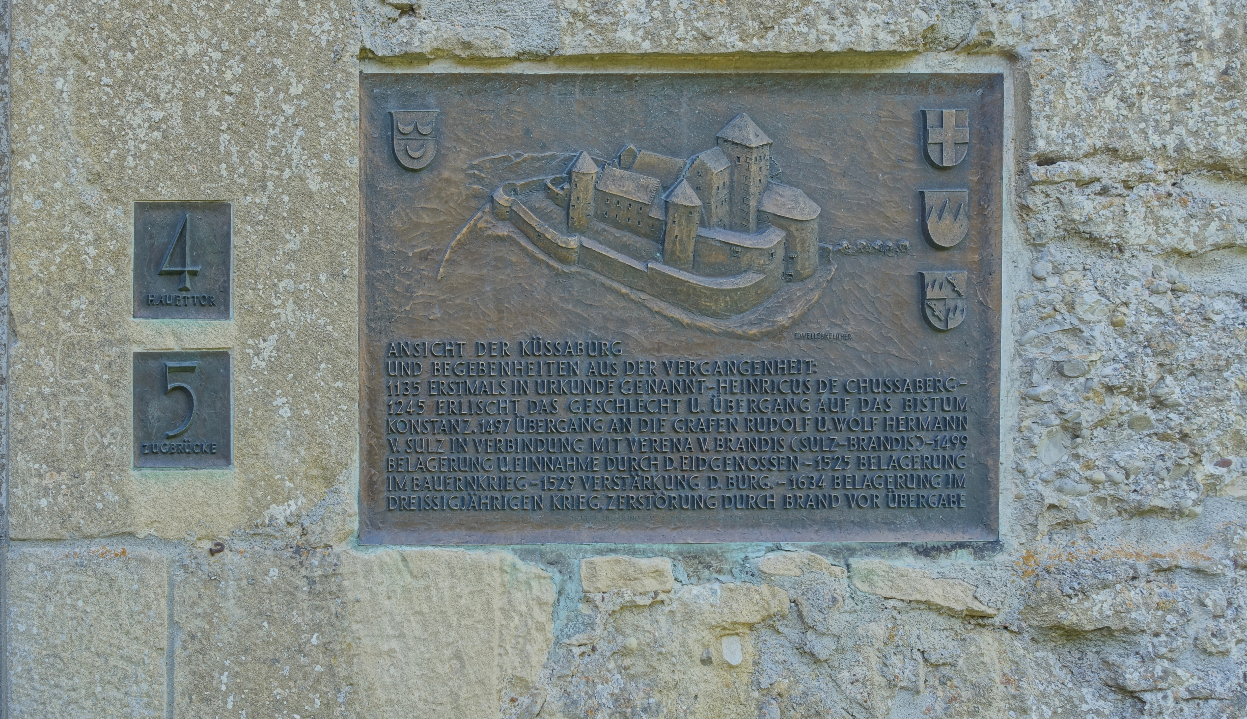 Küssaburg Detail